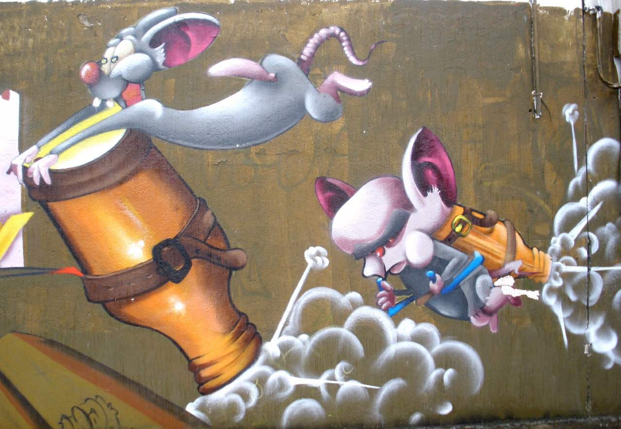 Graffiti en Lugones, Asturias